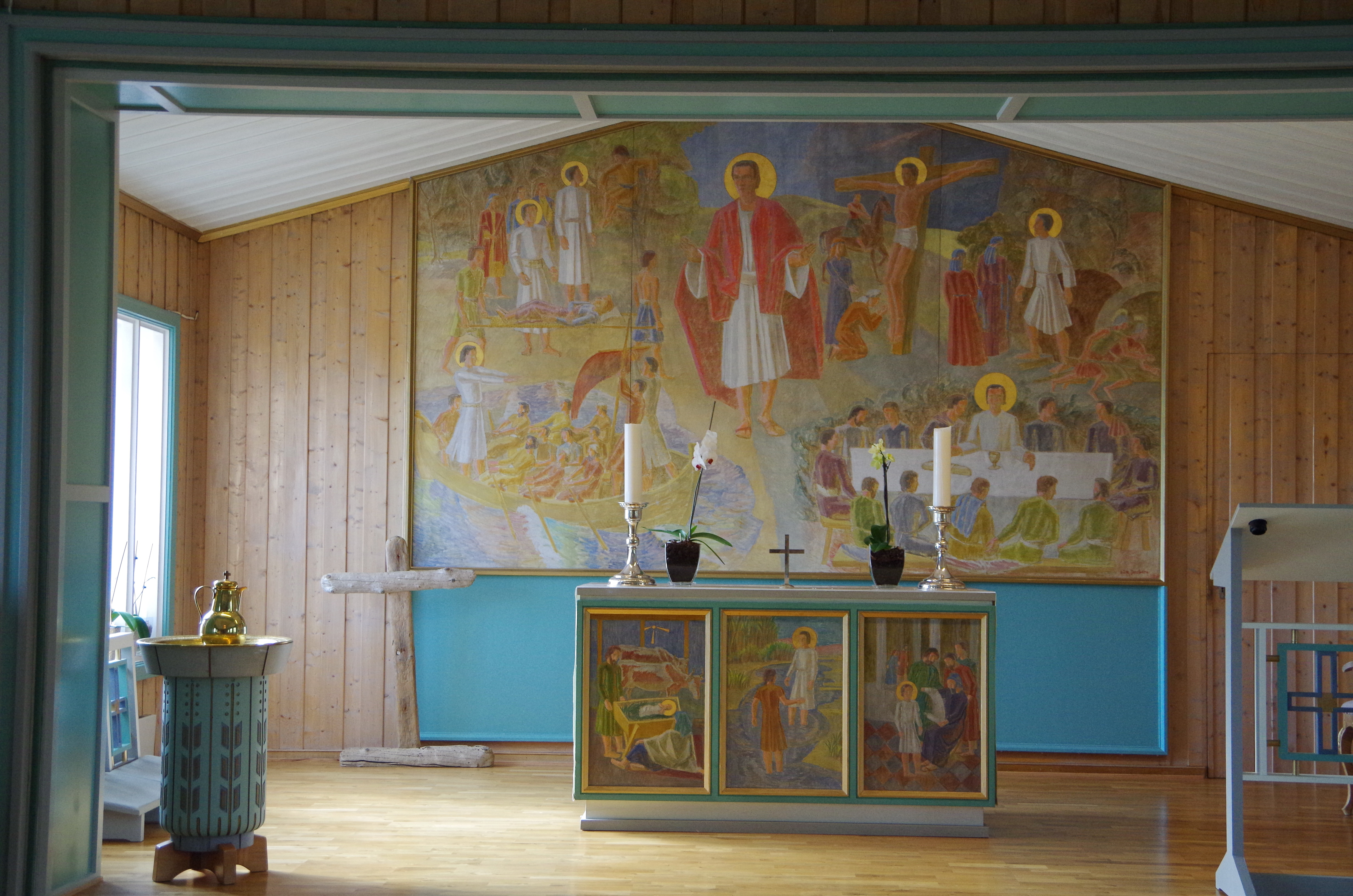 Kirche Svalbard innen